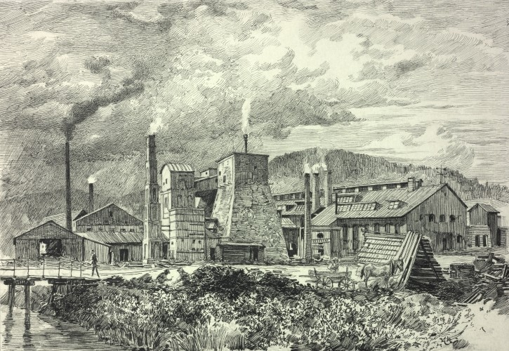 Frýdlant nad Ostravicí, arcibiskupské železárny